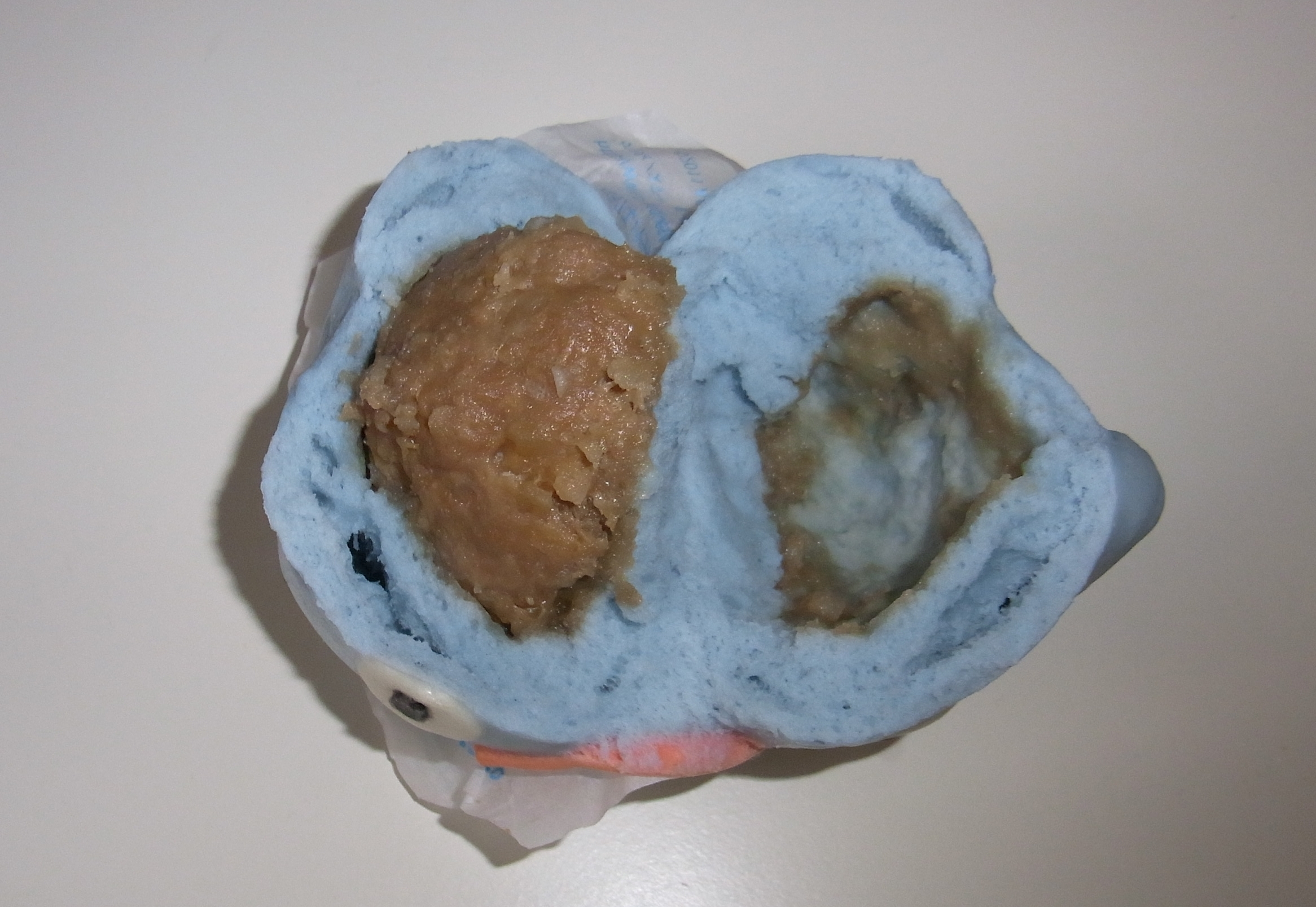 スライム肉まん中身 2011年11月29日購入 余白カット